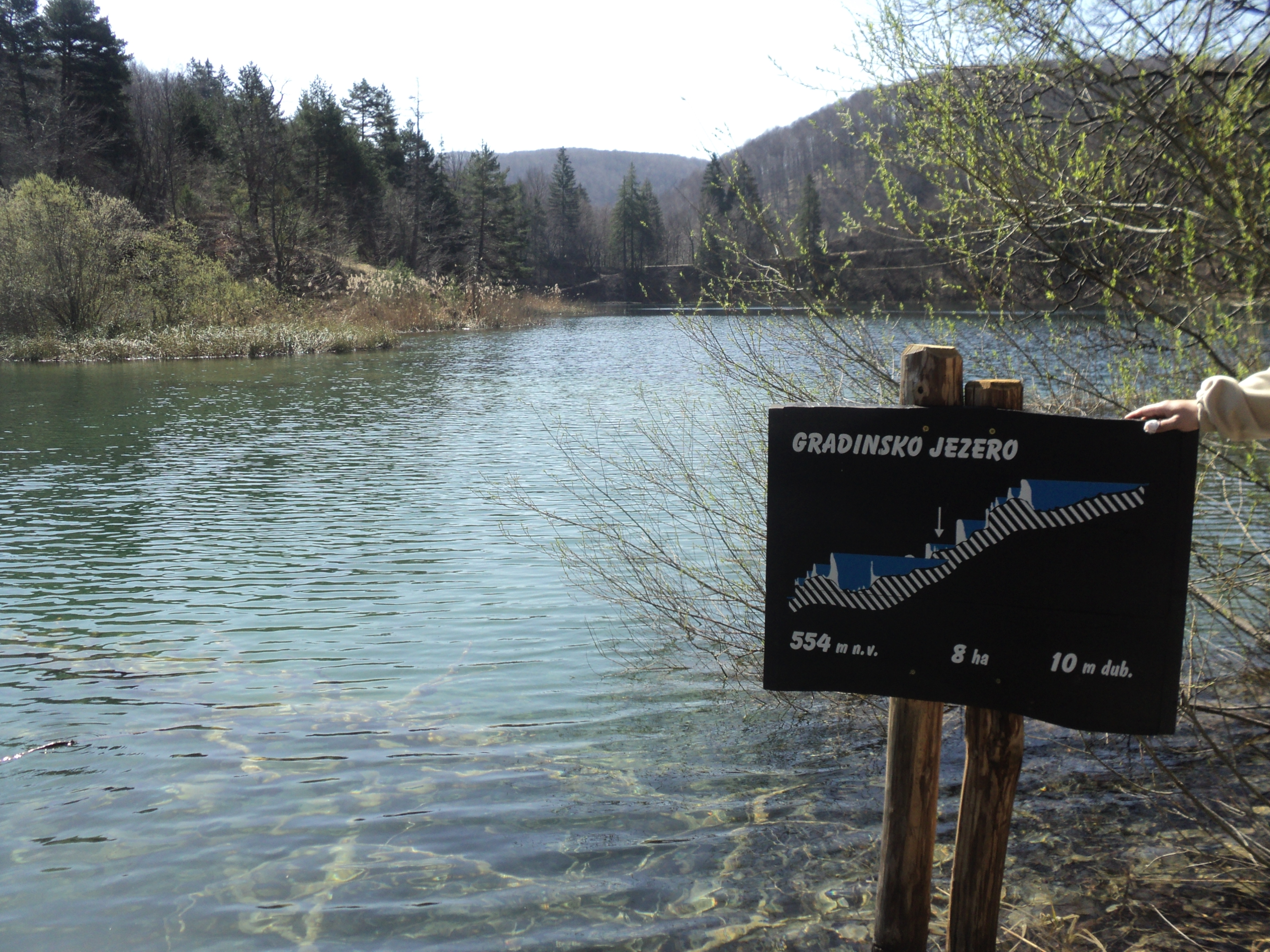 Gradinsko jezero spada u Plitvička jezera, u skupinu Gornjih jezera.